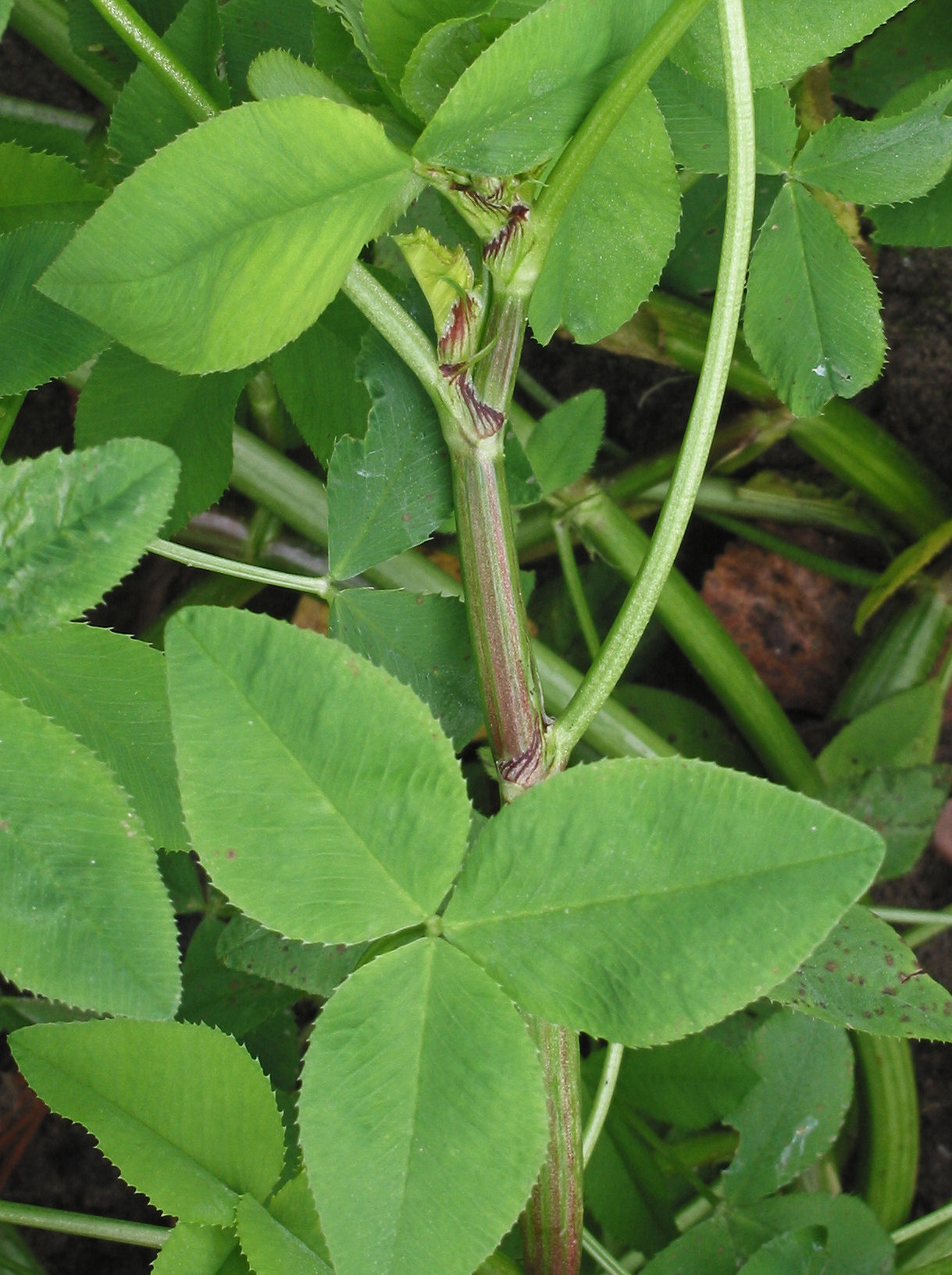 Trifolium hybridum (Basterdklaver steunblaadjes)